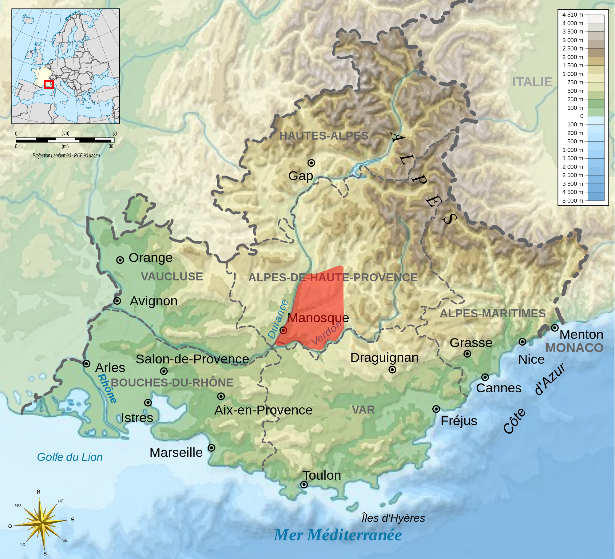 Situation du plateau de Valensole. Le fond de carte utilisé provient de